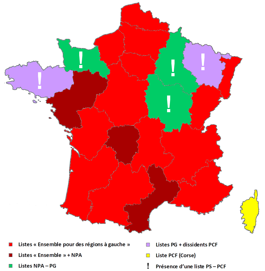 Cartographie de la situation des listes unitaires de la gauche antilibérale au premier tour des élections régionales françaises de 2010.